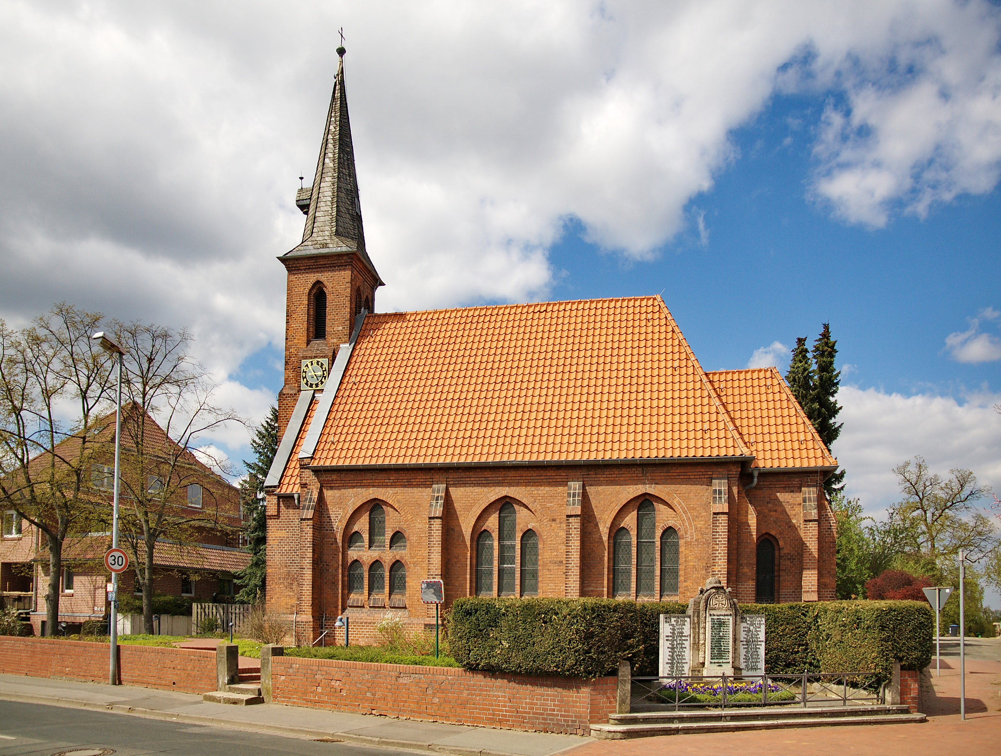 Neugotische Barbarakirche von 1882 in Harenberg (Seelze), Niedersachsen, Deutschland